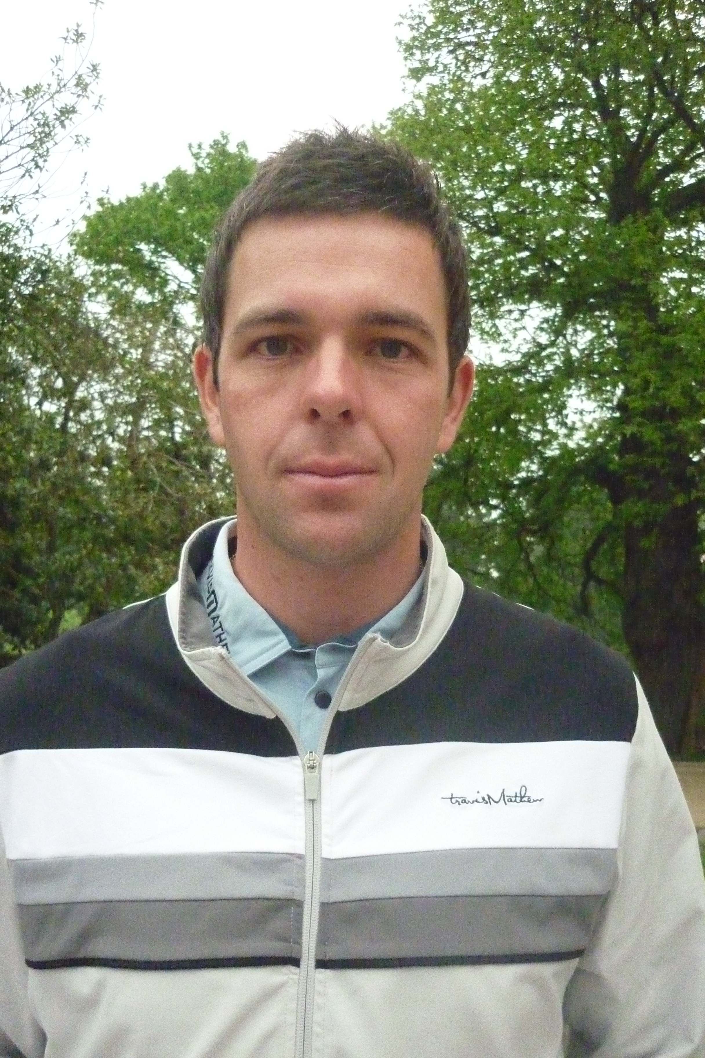 Charlie Ford op de Telenet Trophy 2012